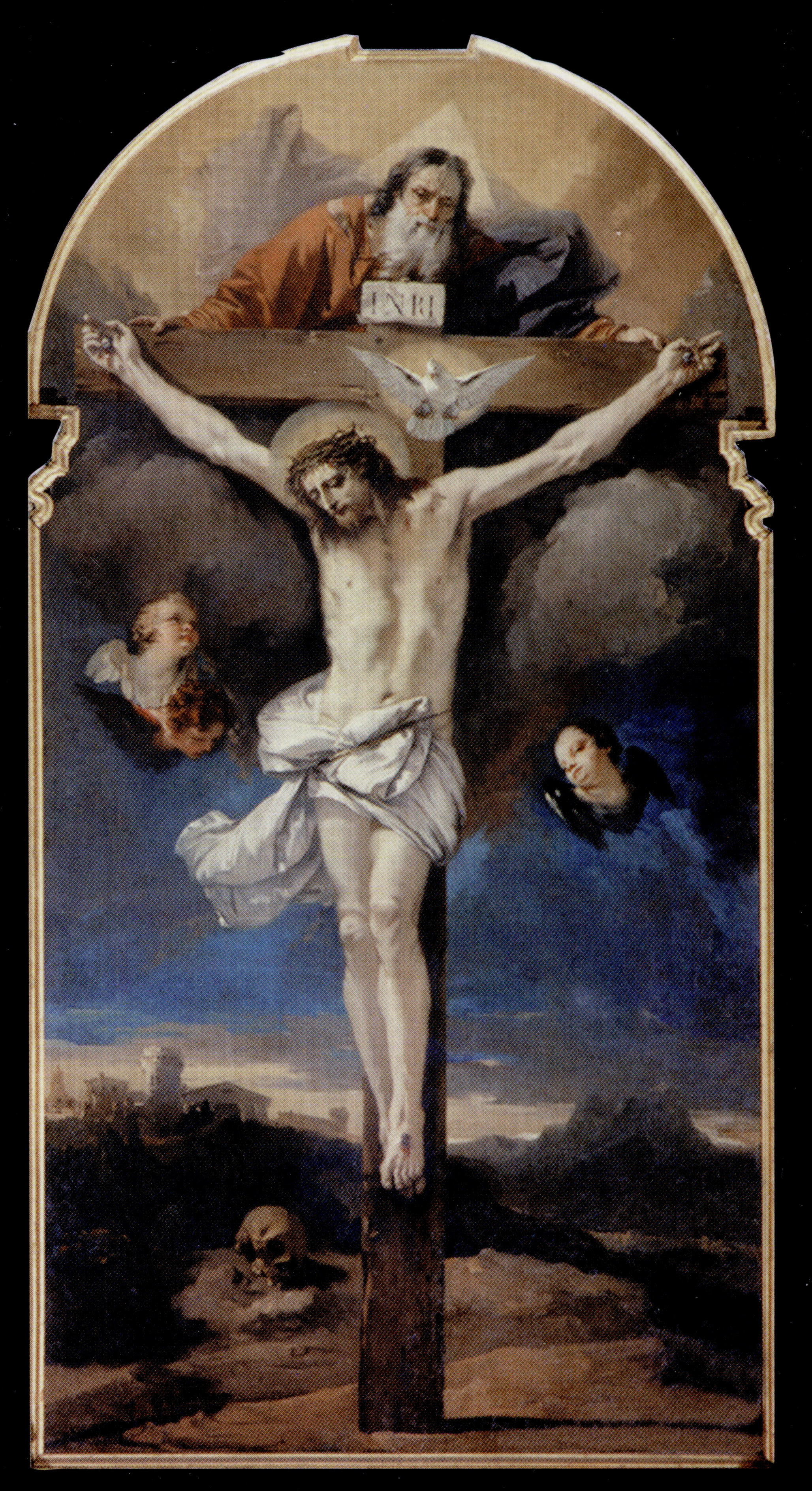 Duomo di Udine - Giovanni Battista Tiepolo - Trinità